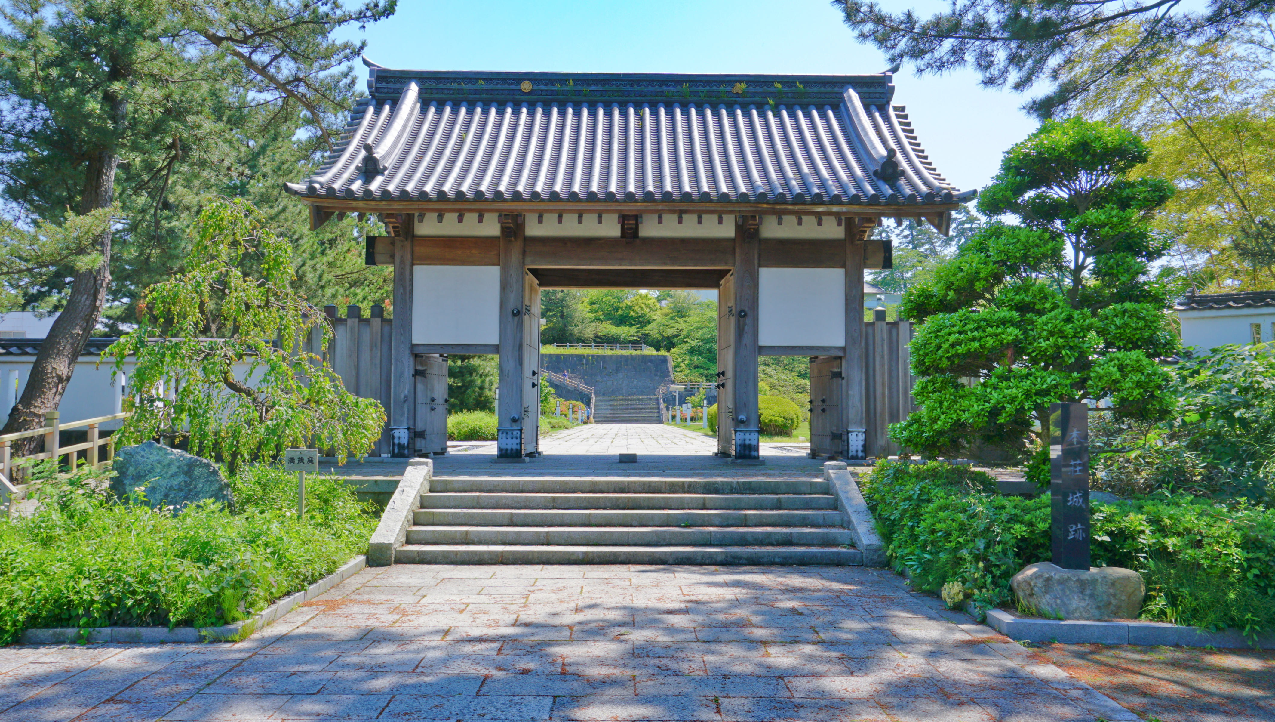 本荘城 復元大手門（秋田県由利本荘市）